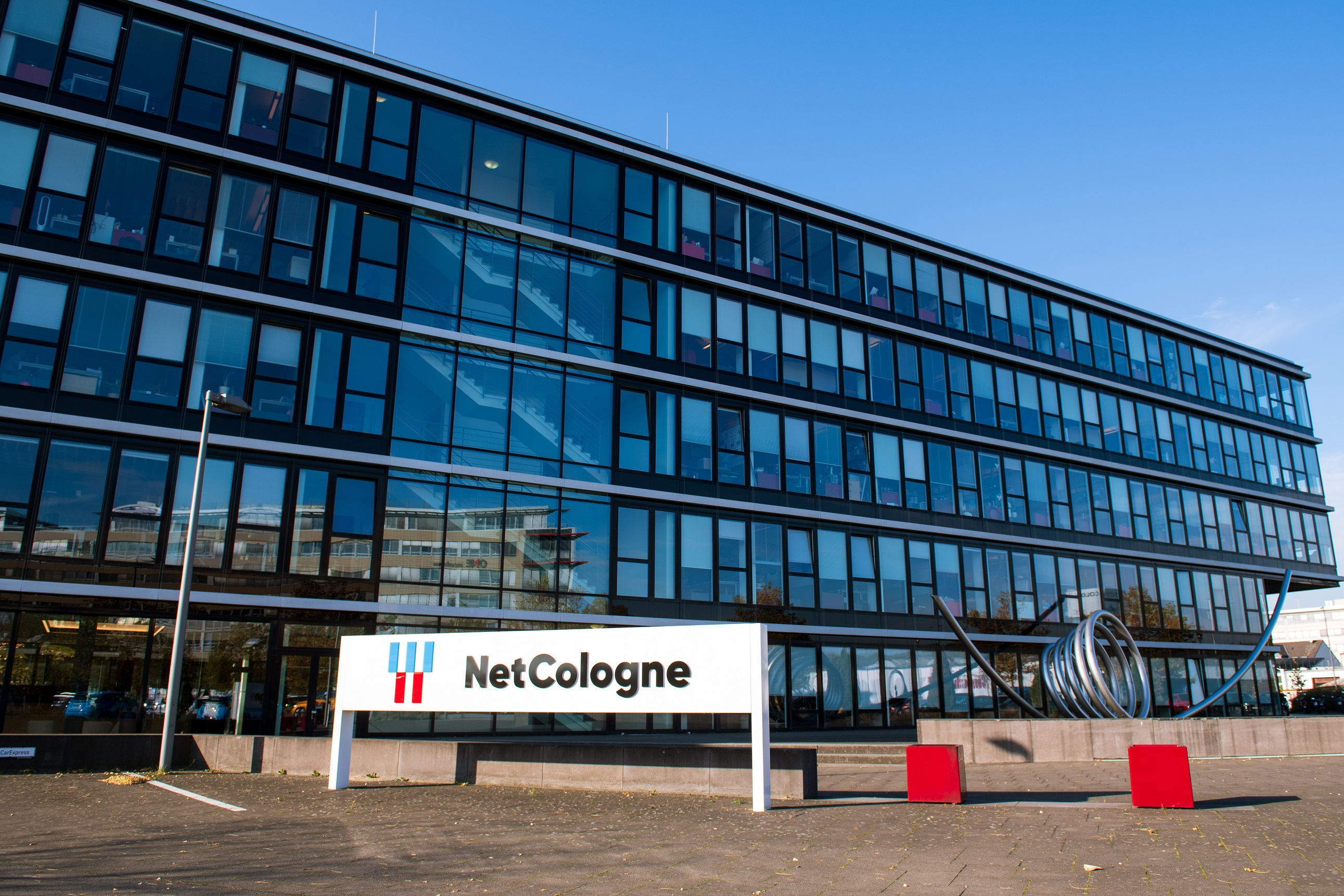 Hauptsitz des Telekommunikationsanbieters NetCologne in Köln-Ossendorf